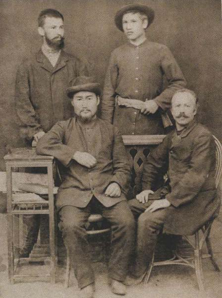 Н.Ф. Катанов (1862 - 1922) в Урумчи. Сидит слева.